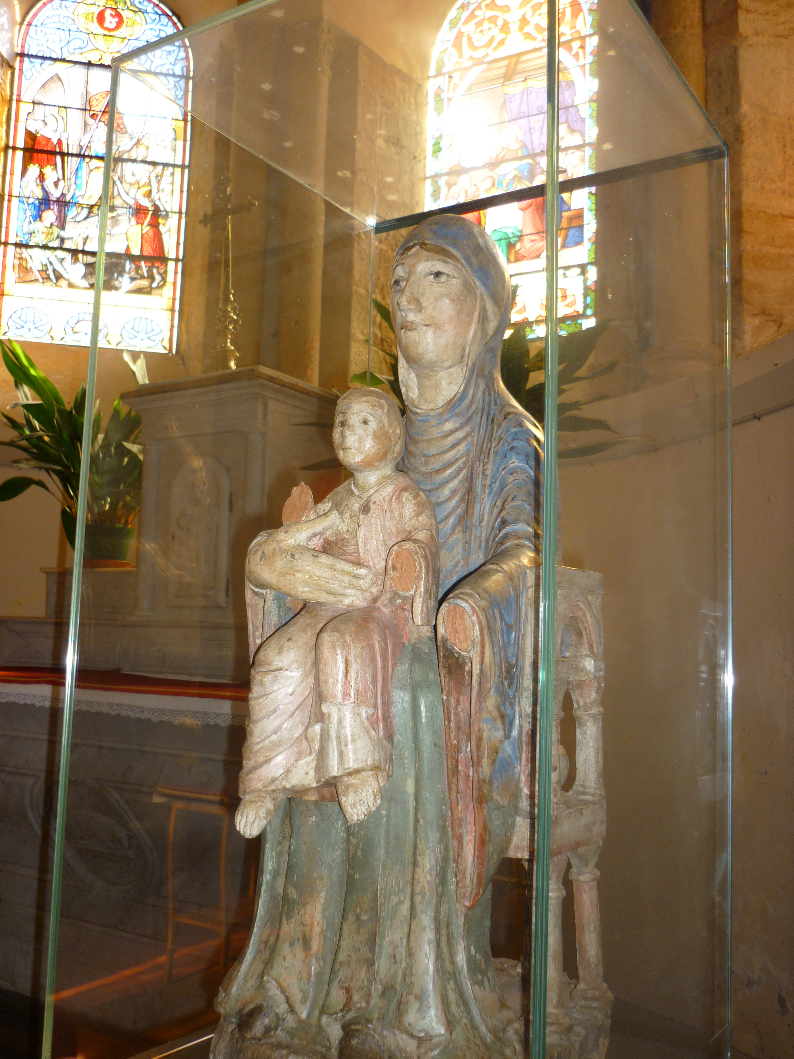 Reproduction de la vierge auvergnate du Louvre en bois polychromé (XIIe siècle)